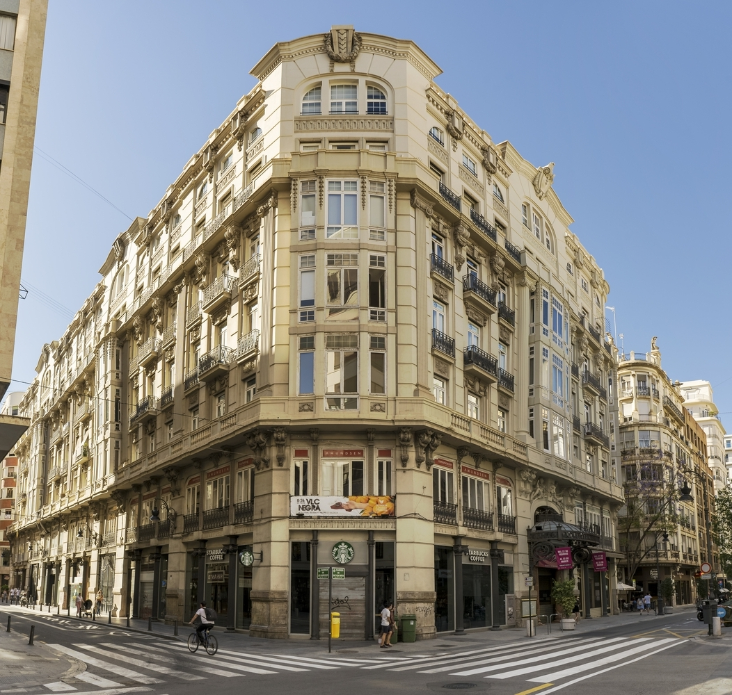 Edificio Olympia en Valencia, obra de Vicente Rodríguez Martín.